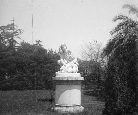 Escultura "Caçador de lleons". Joaquim Bordons i Wehrle (Entre 1901 i 1914). "Caçador de lleons", d'Agapit Vallmitjana, al parc de la Ciutadella de Barcelona.